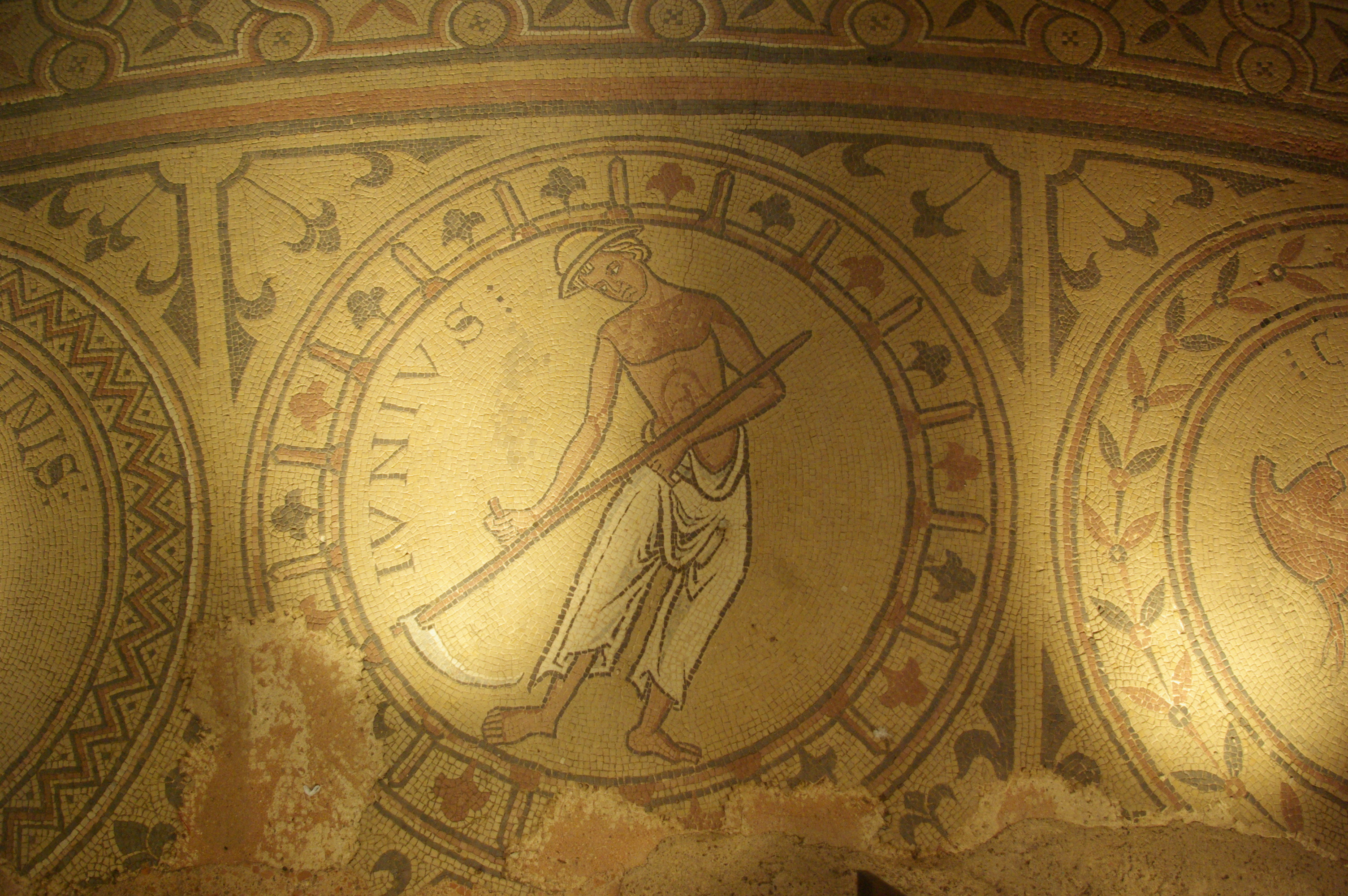 Mosaïques de l'Abbaye Saint-Philibert de Tournus − Iunius